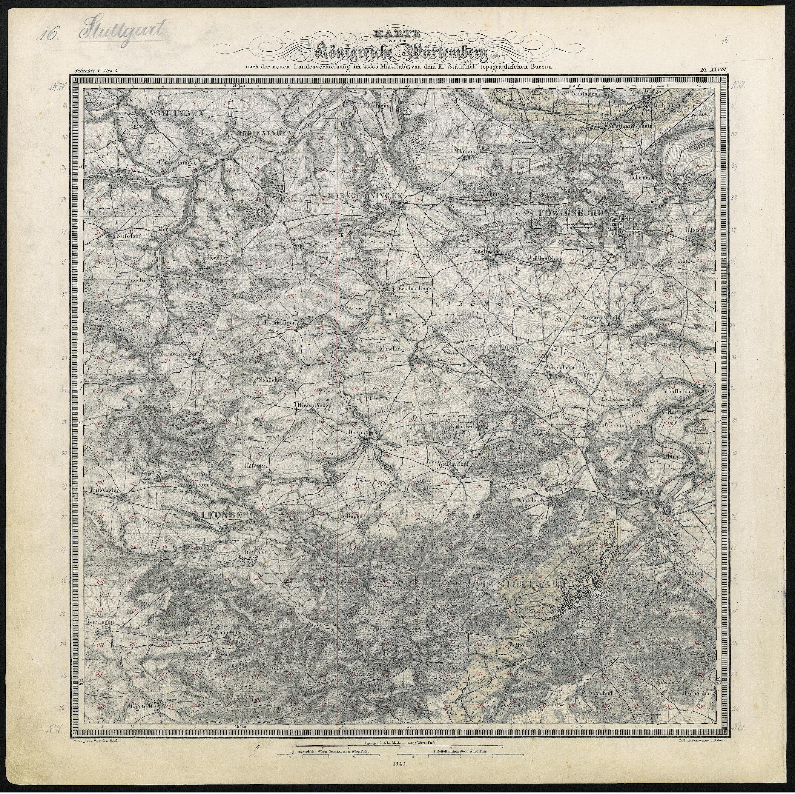 Blatt 16 Stuttgart von 1840 des Topographischen Atlas des Königreichs Württemberg, Maßstab 1:50.000, mit rot markierter Quadranten-Grenze, Flurkarten-Grenzen und Basislinie Solitude-Allee der Württembergischen Landesvermessung. Übersicht der Einzelblätter → hier.